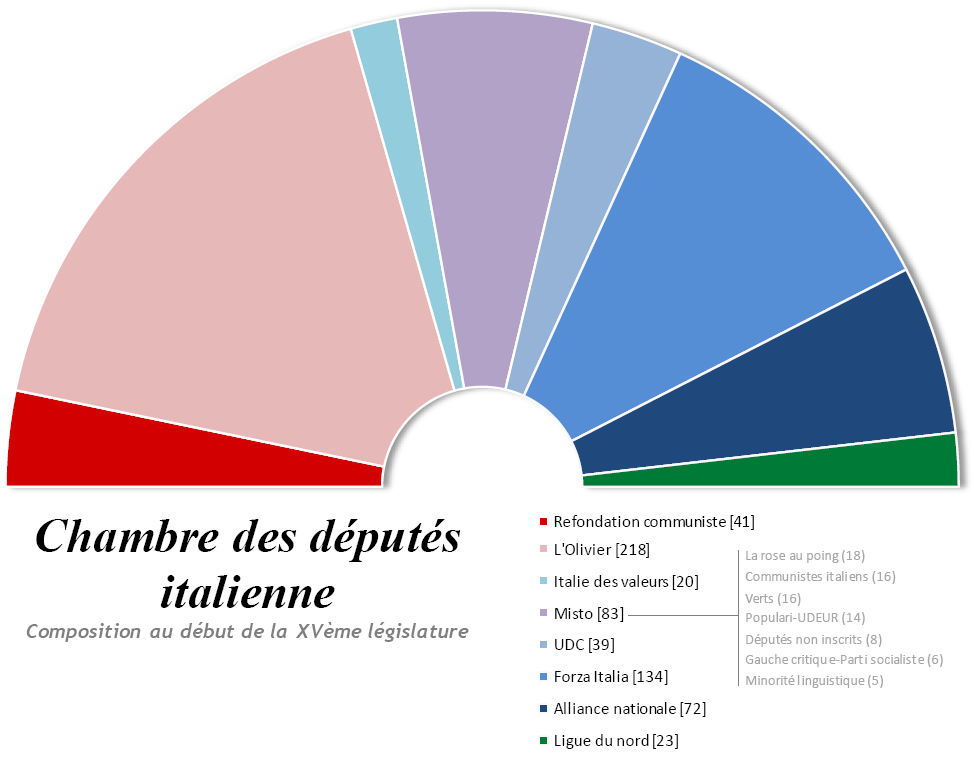 Composition de la Chambre des députés italienne, XVe législature, mai 2006. Répartition des députés par groupes parlementaires